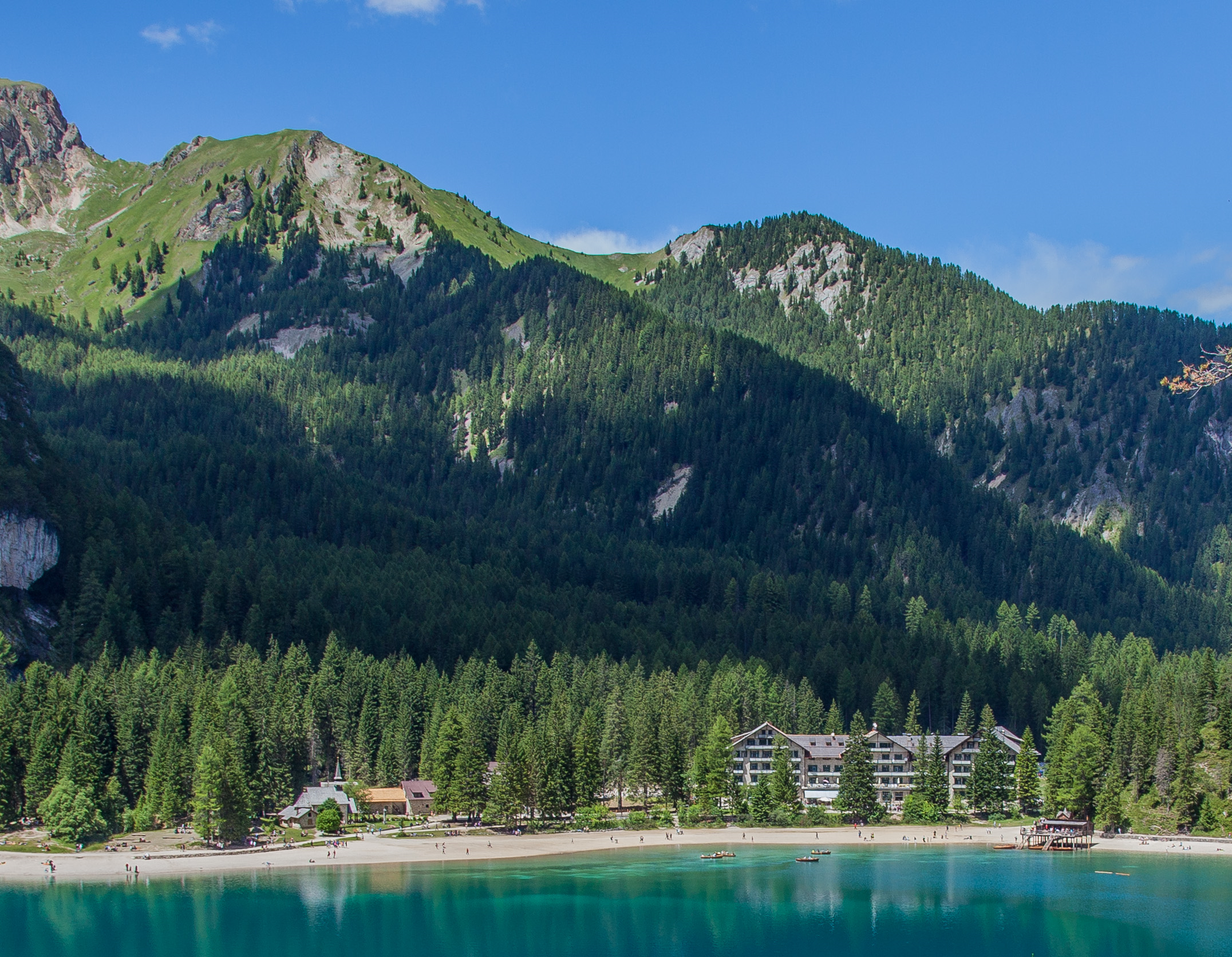 Hotel Pragser Wildsee (Ausschnitt von File:Pragser Wildsee 033.jpg von Fischer.H)